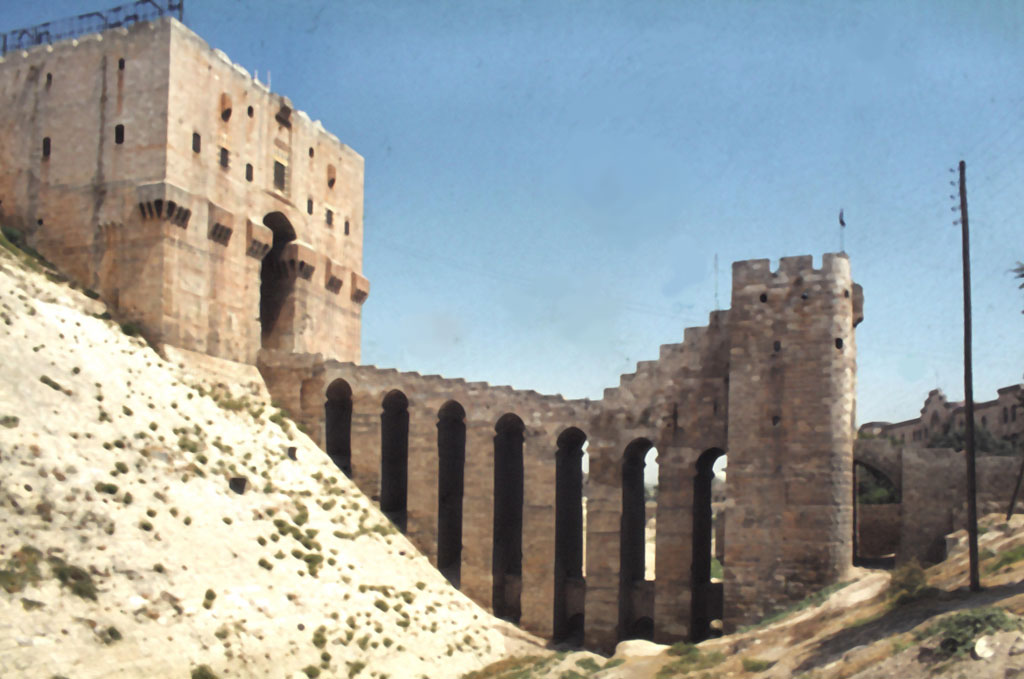 Rampe d'entrée de la citadelle d'Alep